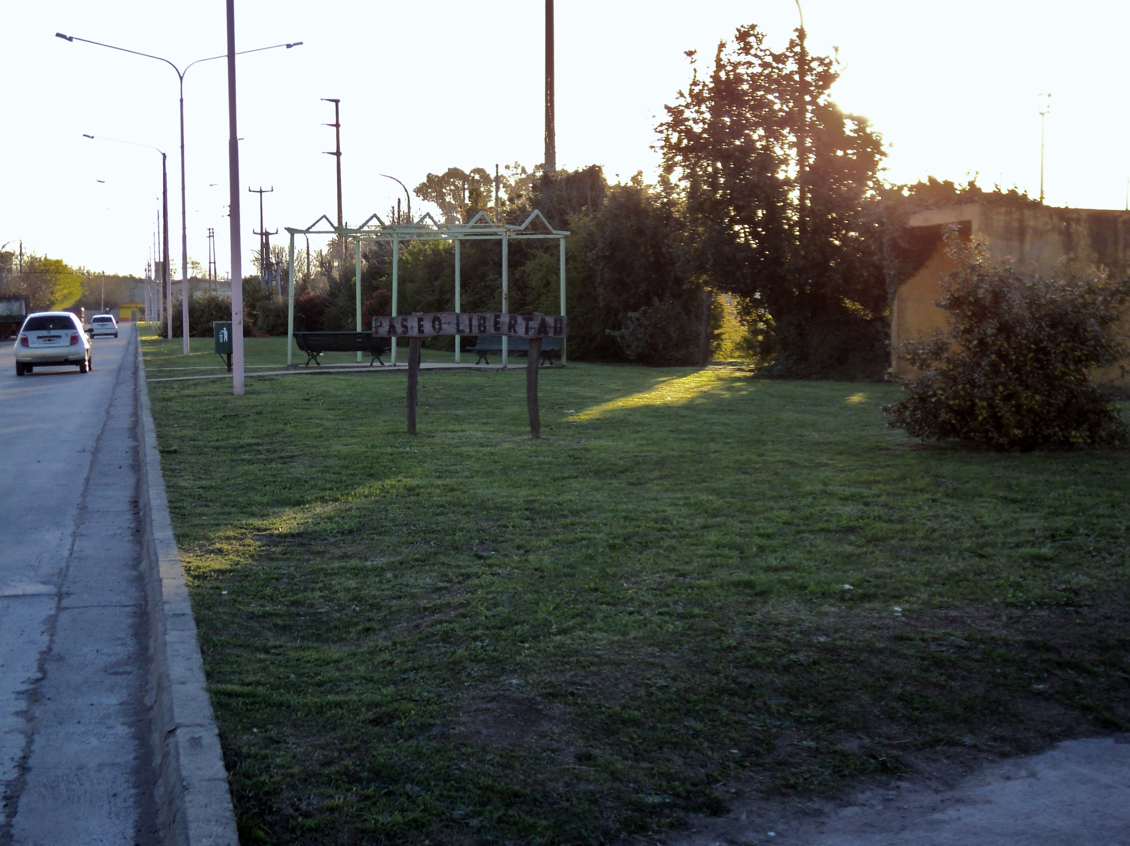 paseo verde a metros de la estacion